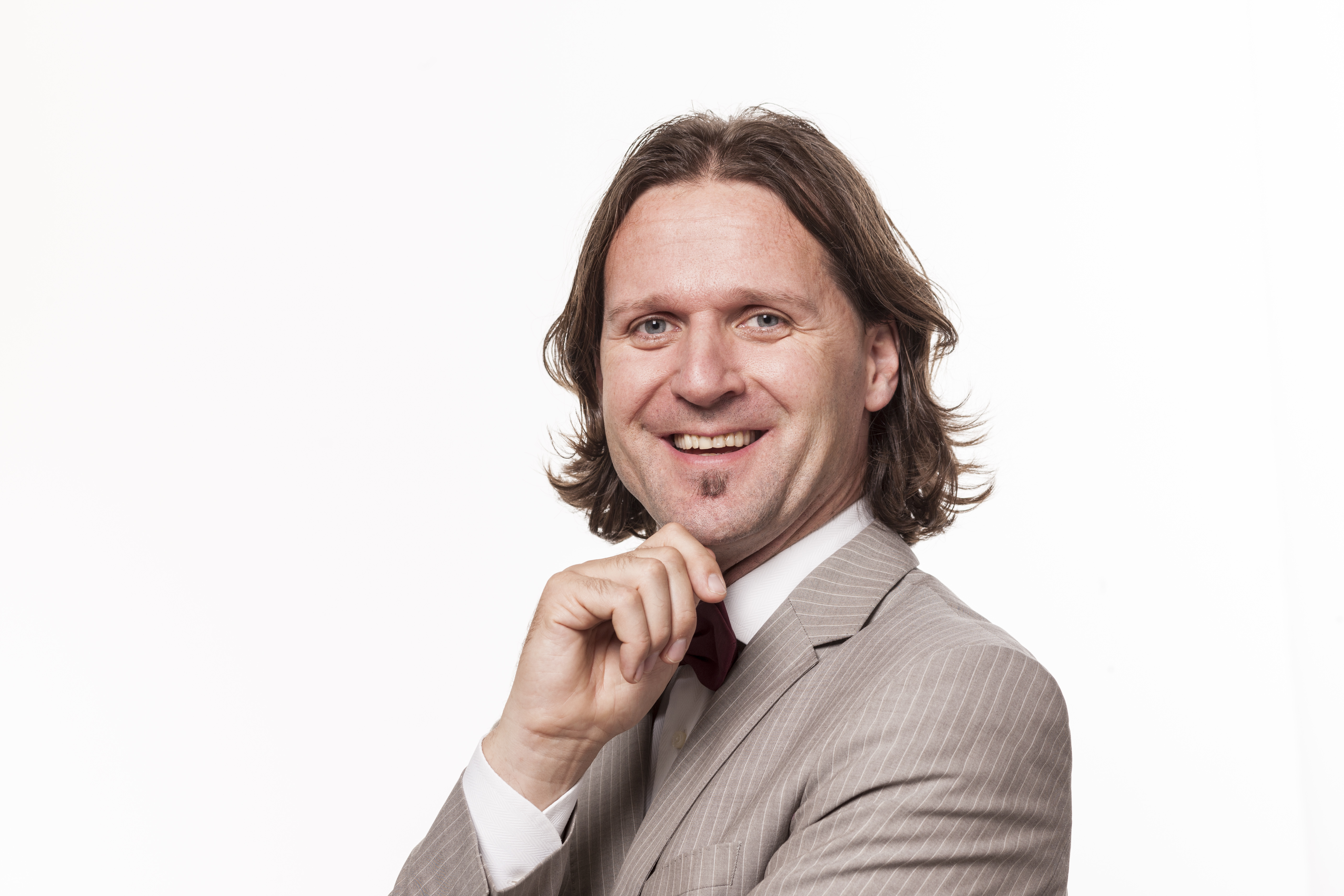 Porträt von Timo Leukefeld